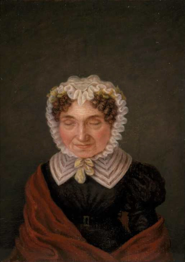 Portret van Petronella Moens (1762-1843)